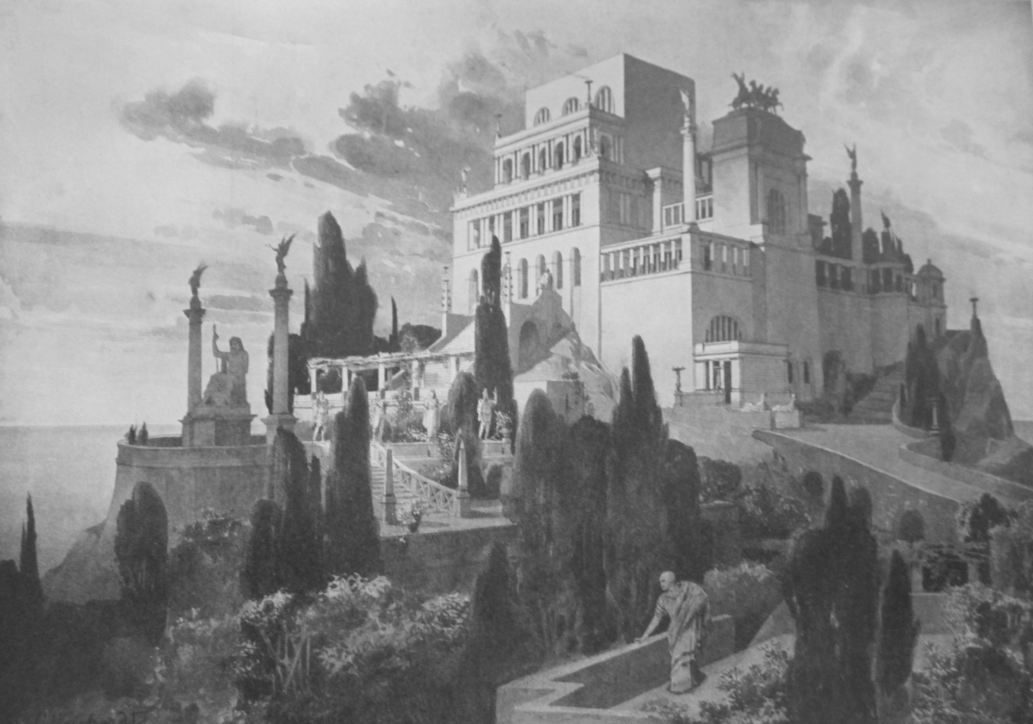 Rekonstruktion der Villa Jovis (Capri)